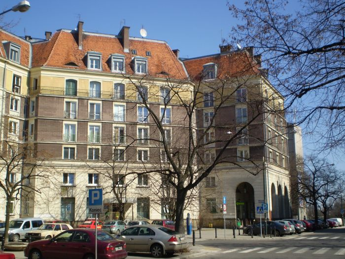 Śródmieście Południowe - osiedle Latawiec